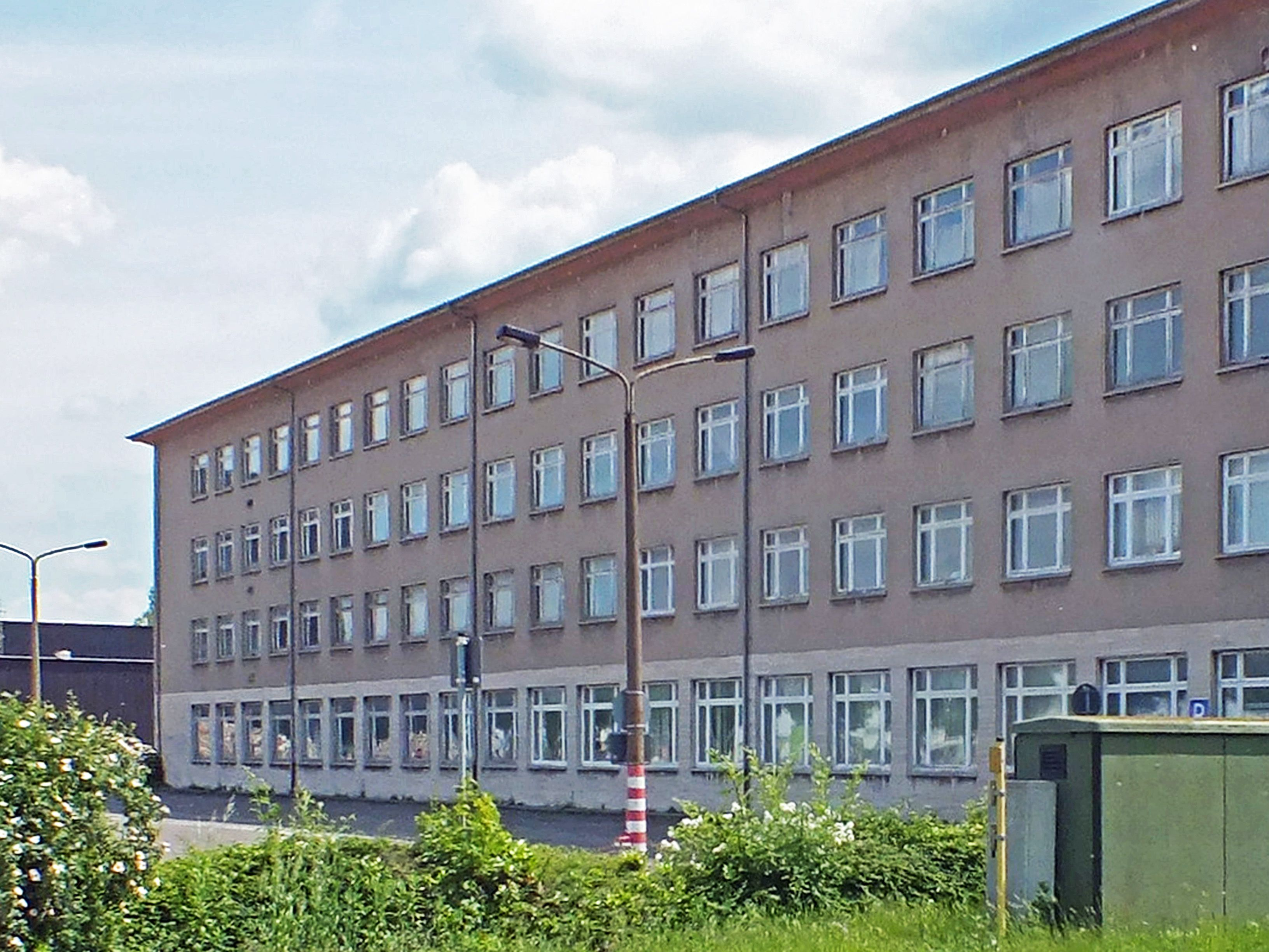 Gebäudeteil des ehemaligen Instituts für Energetik Leipzig, jetzt DBFZ